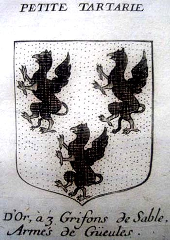 Герб Малой Татарии и потомков падишаха (Золотоордынского хана) Мамая, происходящего от князей Кият, царей Черклы (Черкио, Пантикапея).